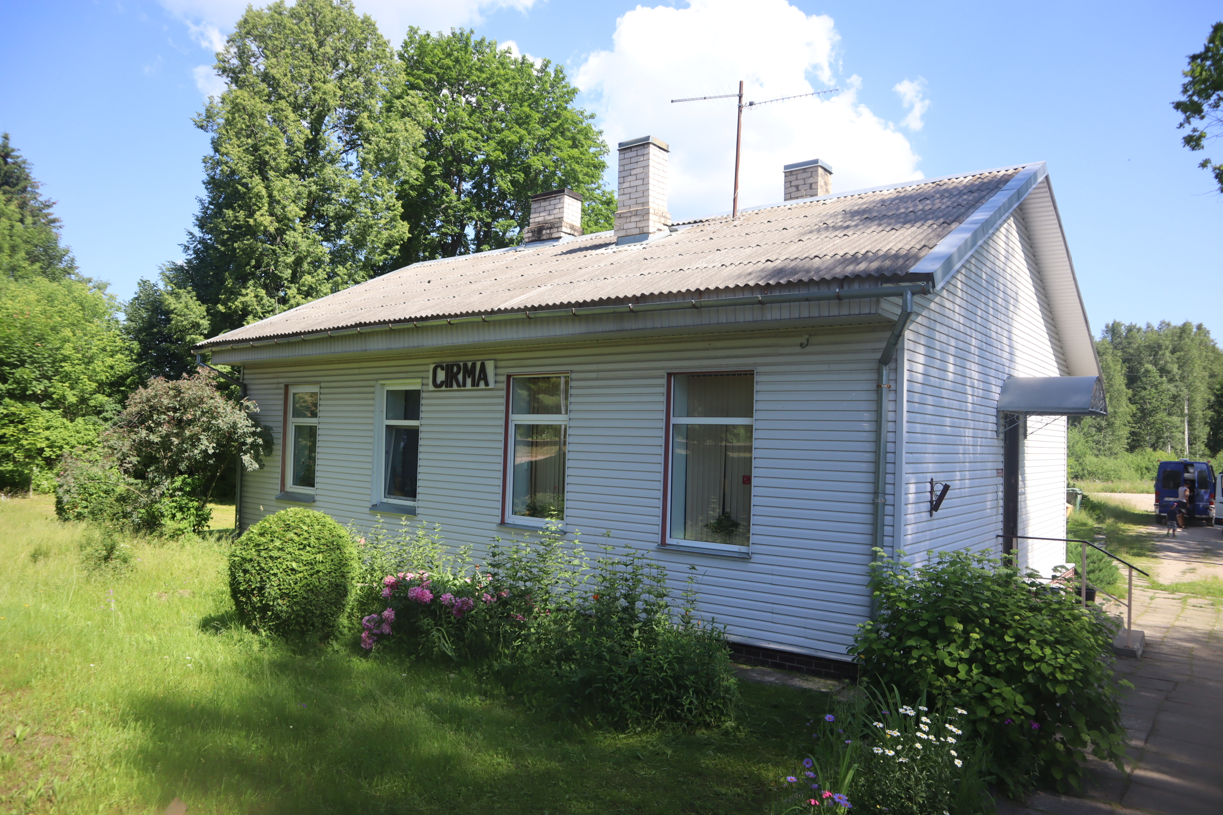 Cirmas pieturas punkta ēka